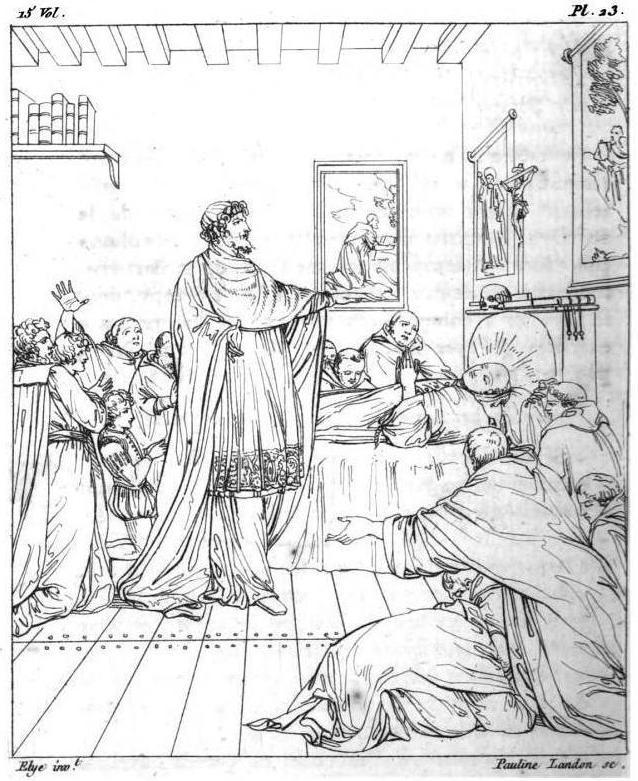 "La mort de dom Jean de la Barrière ; vitrail du Musée des monumens français, par Sempy, d'après Elie".